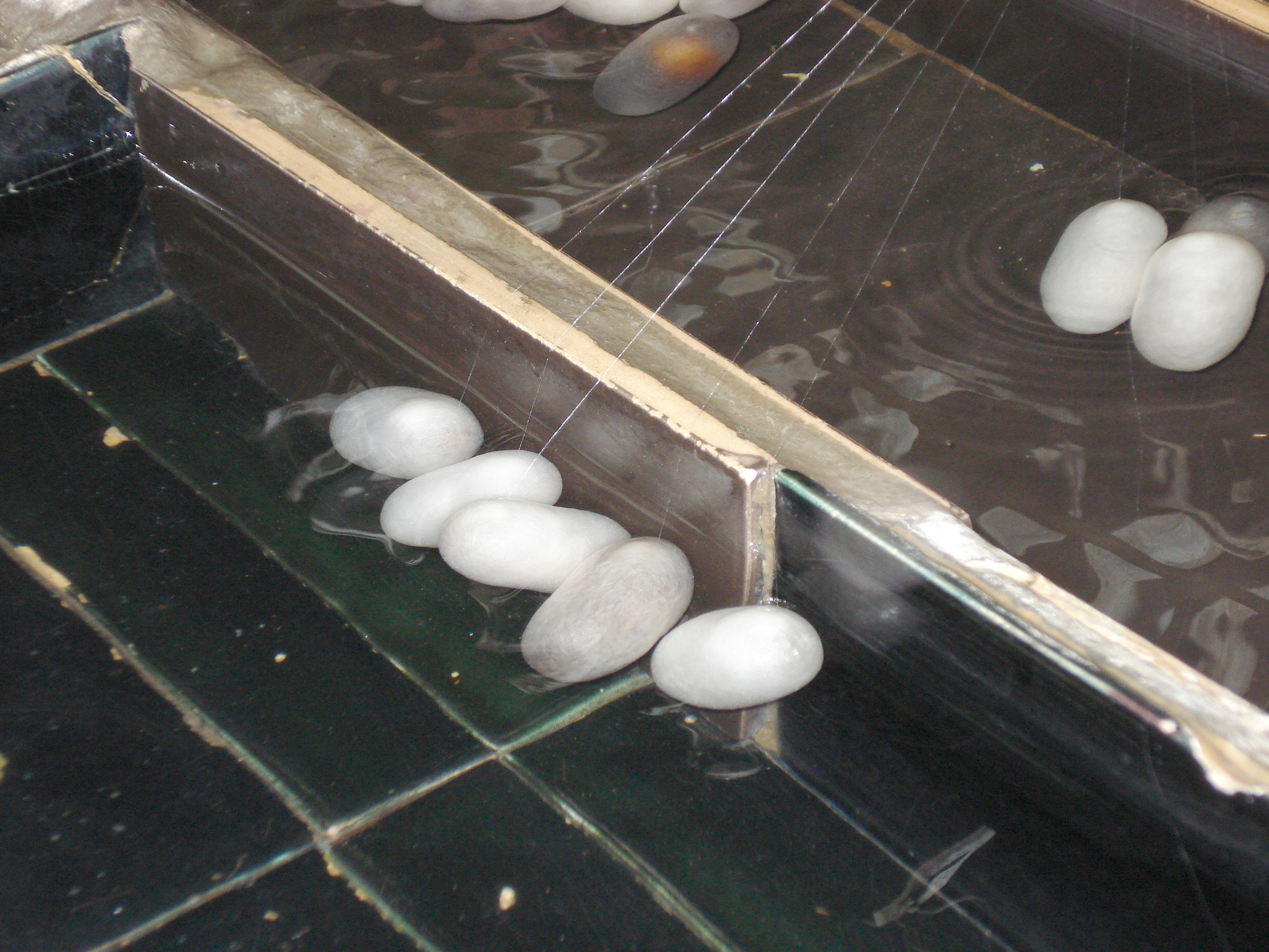 tkalnia jedwabiu Shuzou - wysnuwanie nici z kokonów jedwabników